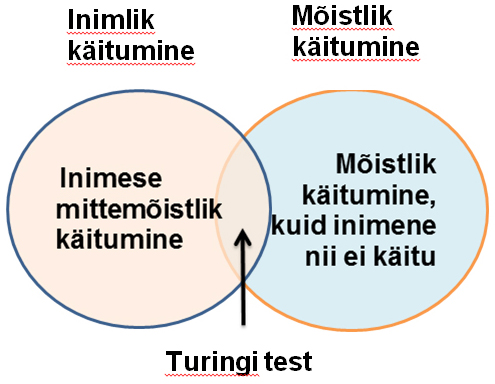 Turingi testi nõrgad küljed